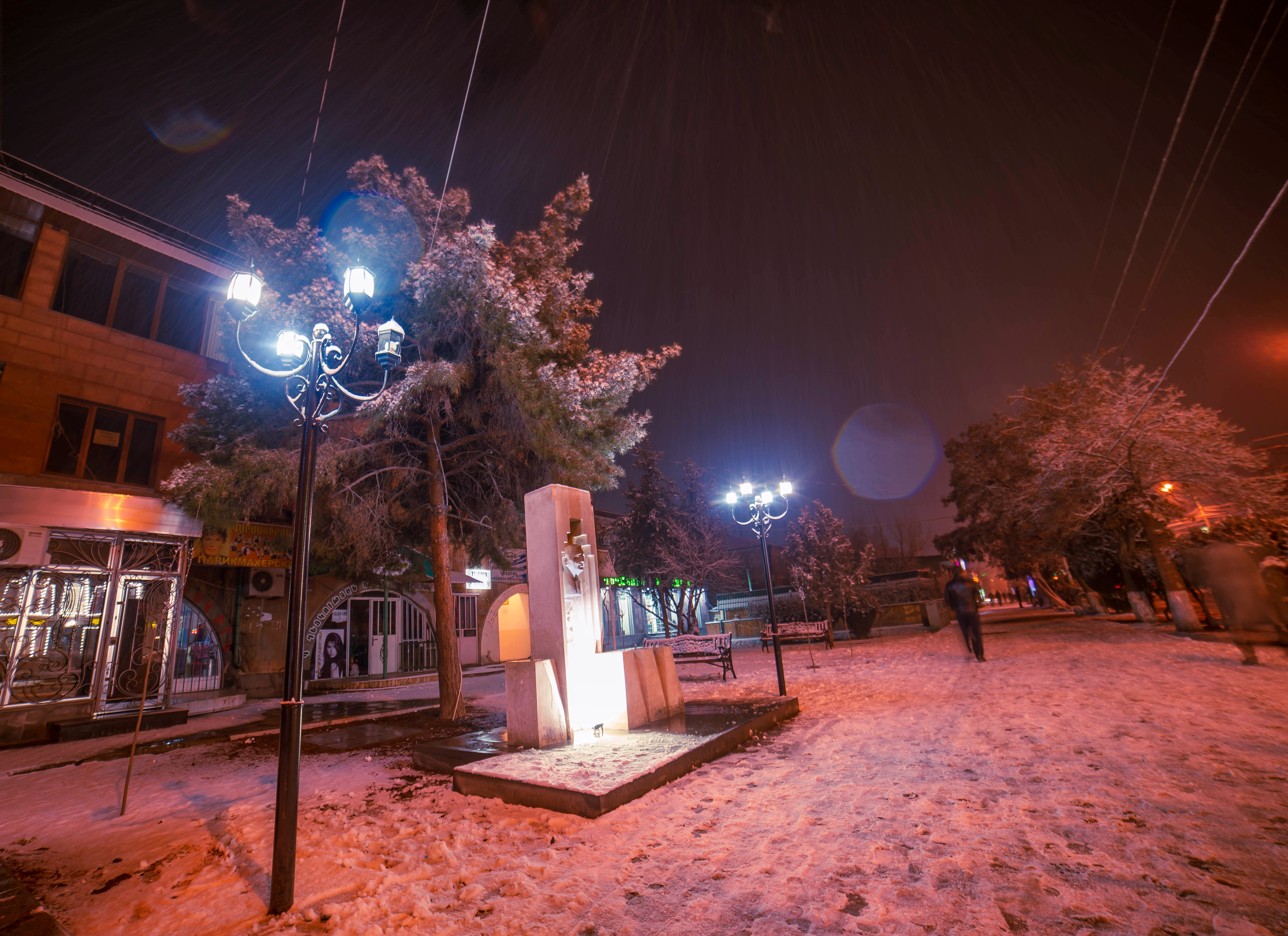 Արմավիր